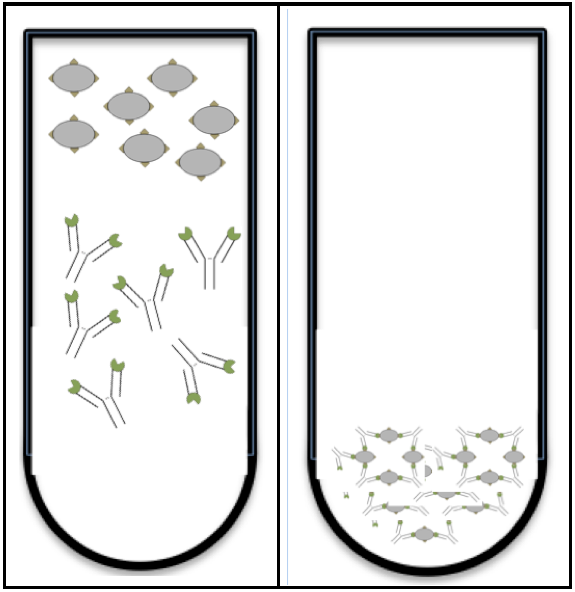 Quan posem una mostra el suport amb Ac específics, els epítops (marró) interactuen amb la regió hipervariable dels anitcósos i formen grans agregats que precipitien.